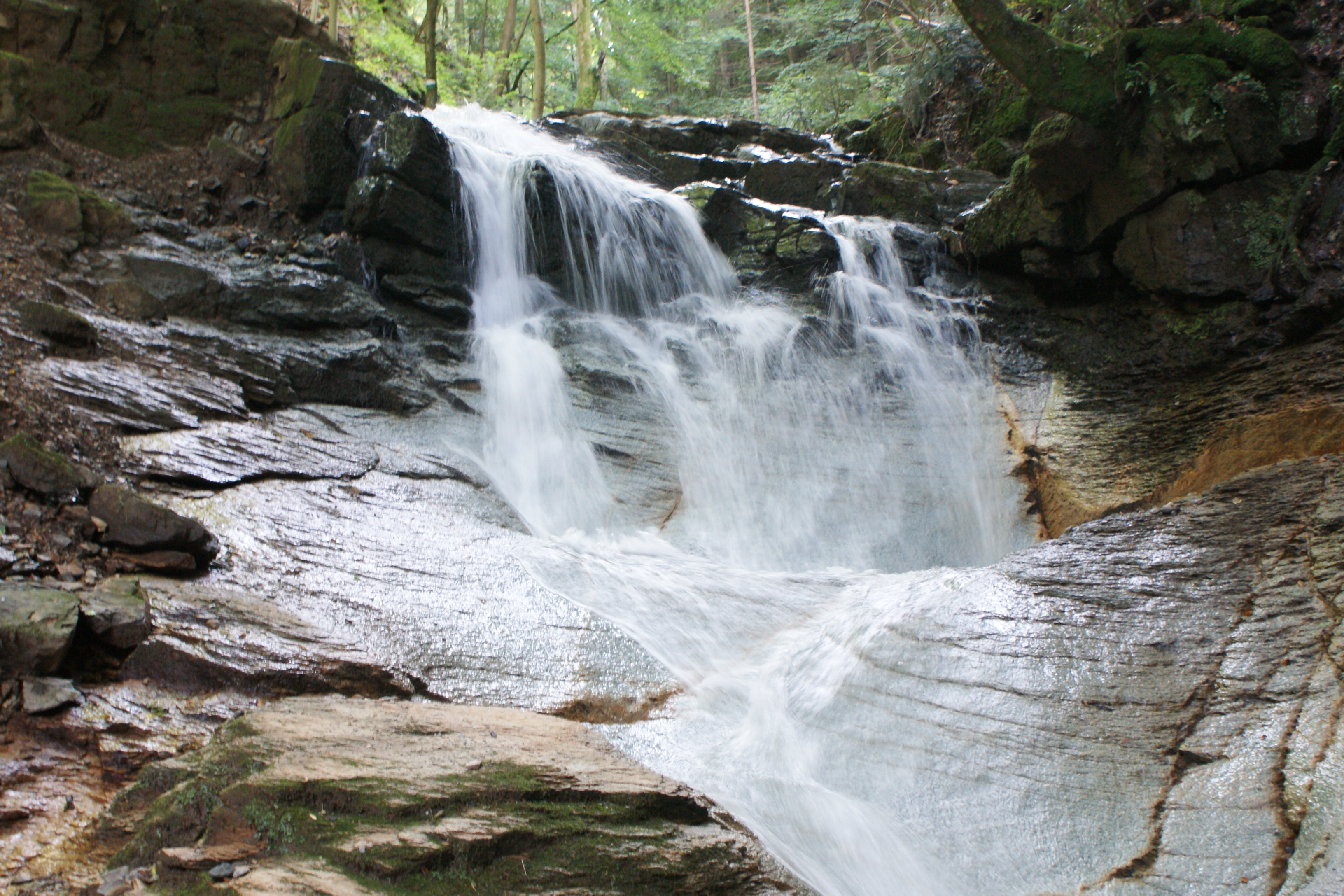 Wasserfall in der Heiligen-Geist-Klamm bei Leutschach